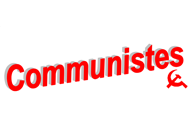 Premier logo du Parti révolutionnaire Communistes (alors nommé Communistes).